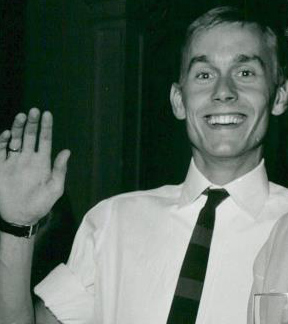 Krister Ekman.